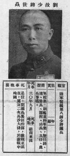 抗戰軍人忠烈錄第一輯中的烈士遺像